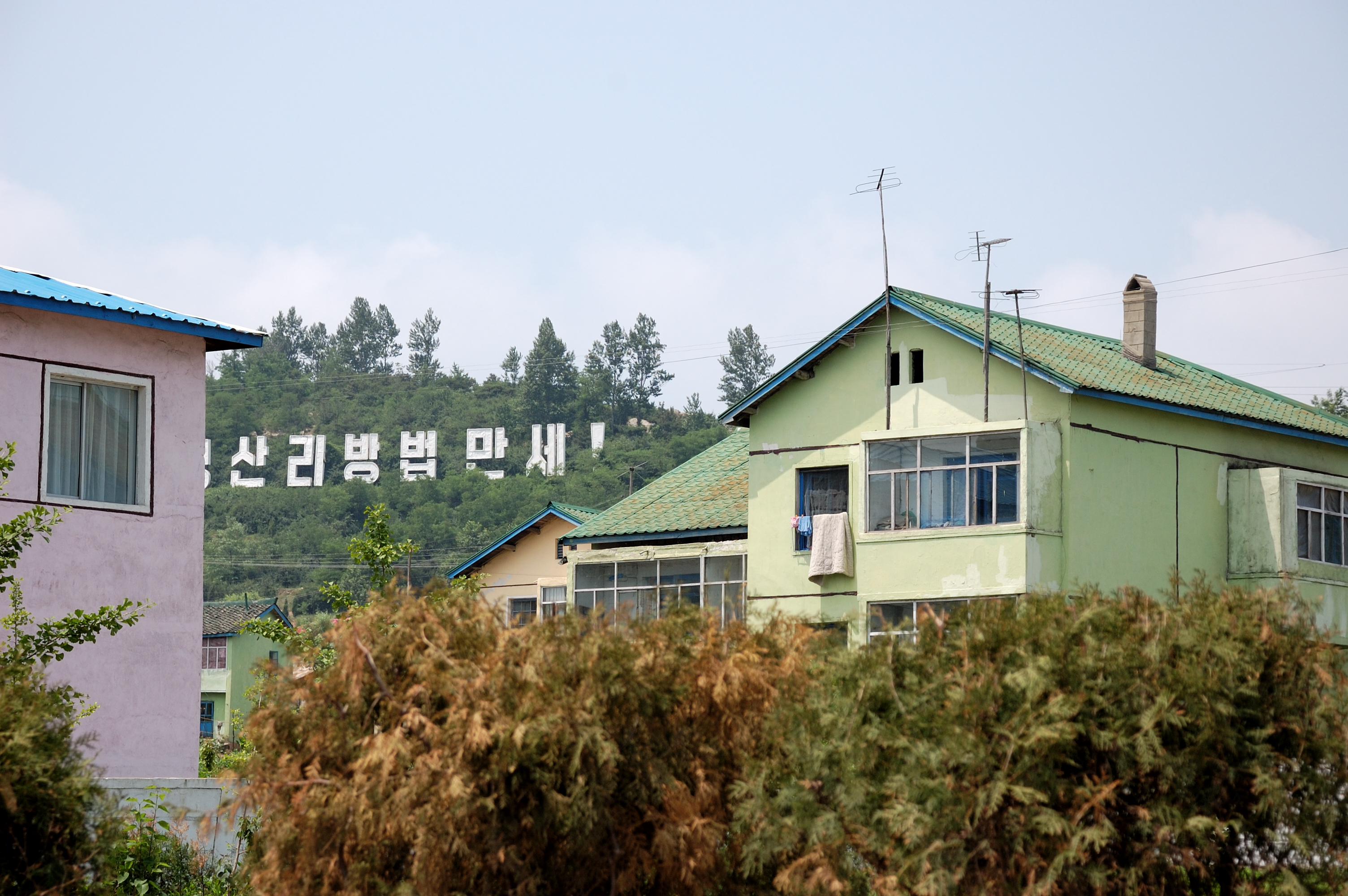 Chongsan-ri Farm, Kangso.